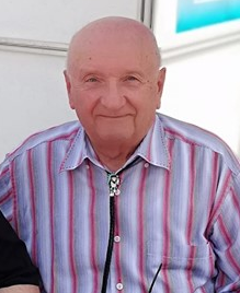 Lőrincz L. László (Szilvásszentmárton, 1939. június 15. –) orientalista, író, műfordító. Írói álnevei: Leslie L. Lawrence, illetve Frank Cockney.